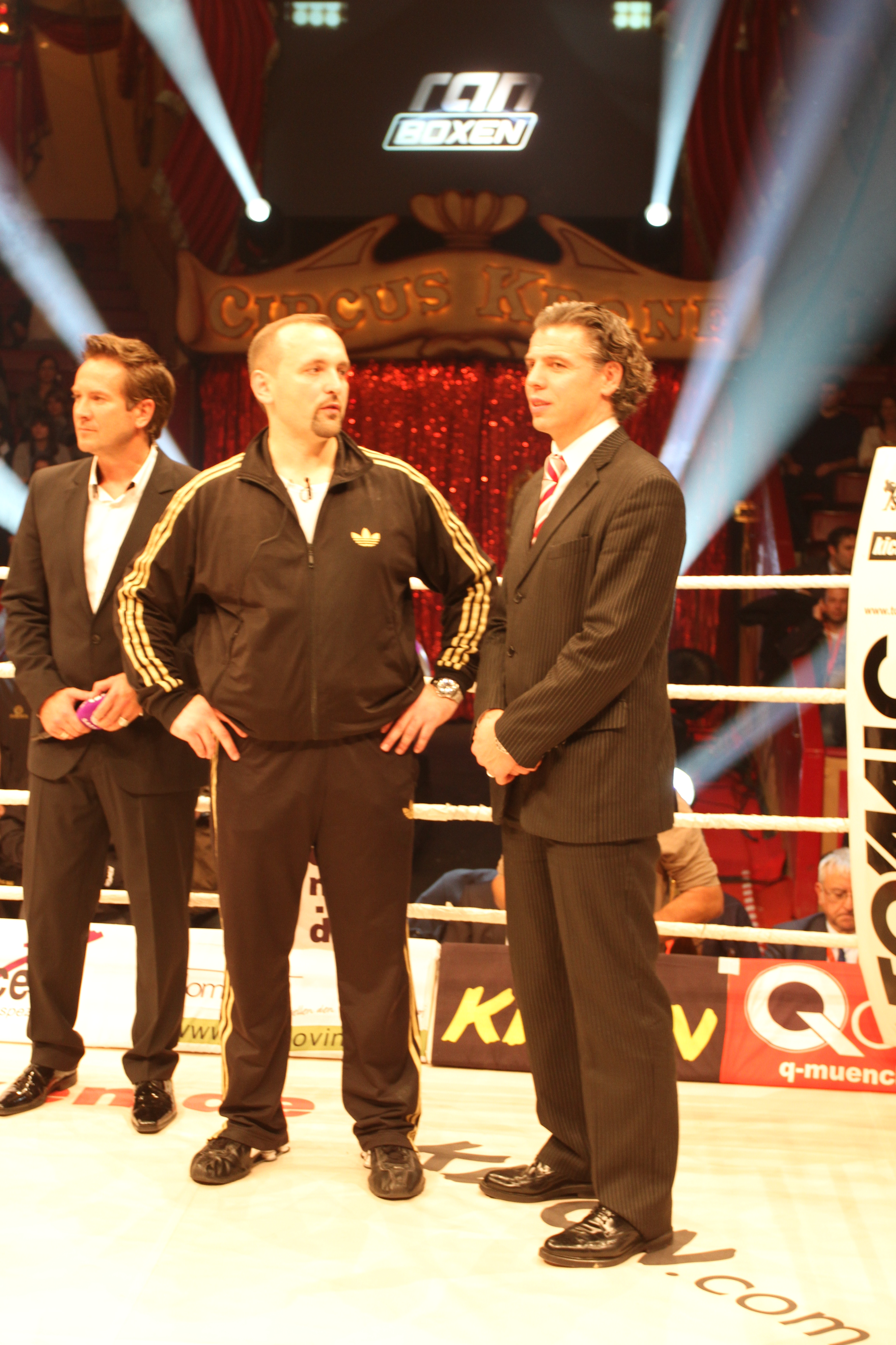 WKA-Präsident Klaus Nonnemacher mit Pavlica Steko und SAT 1 Ringsprecher